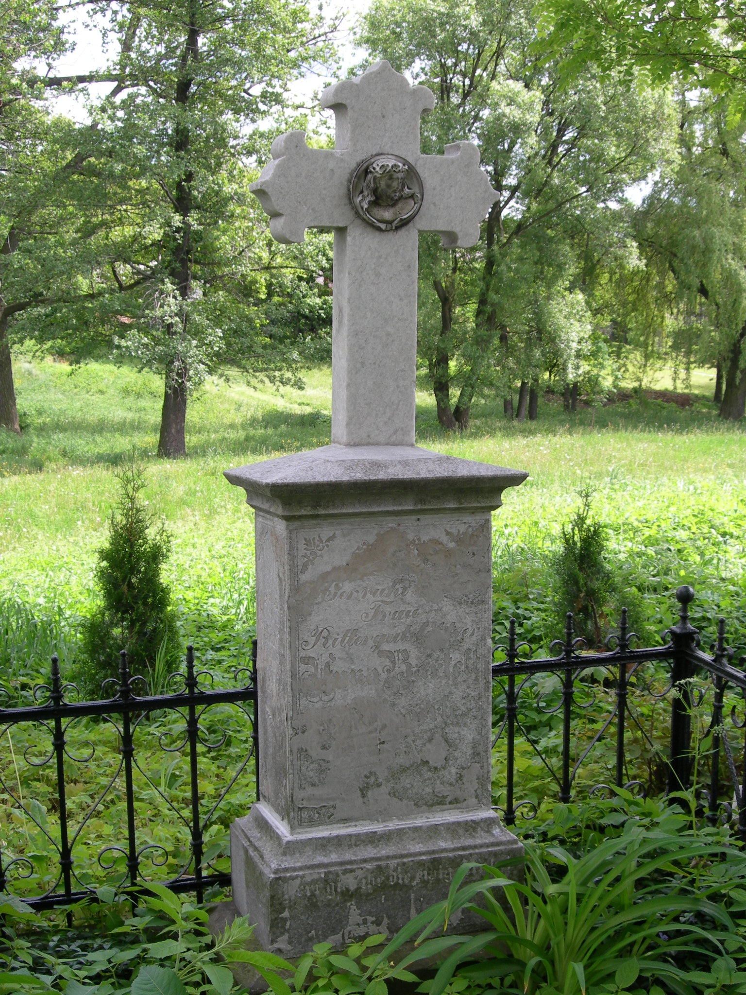 Leszczyny (woj. śląskie) XIX wieczny nagrobek.